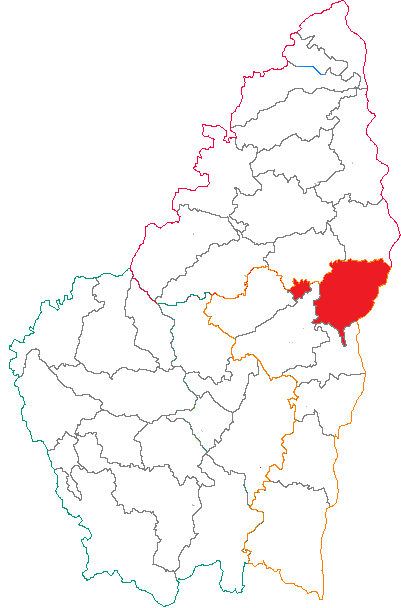 Situation du canton dans le département de l'Ardèche (France)